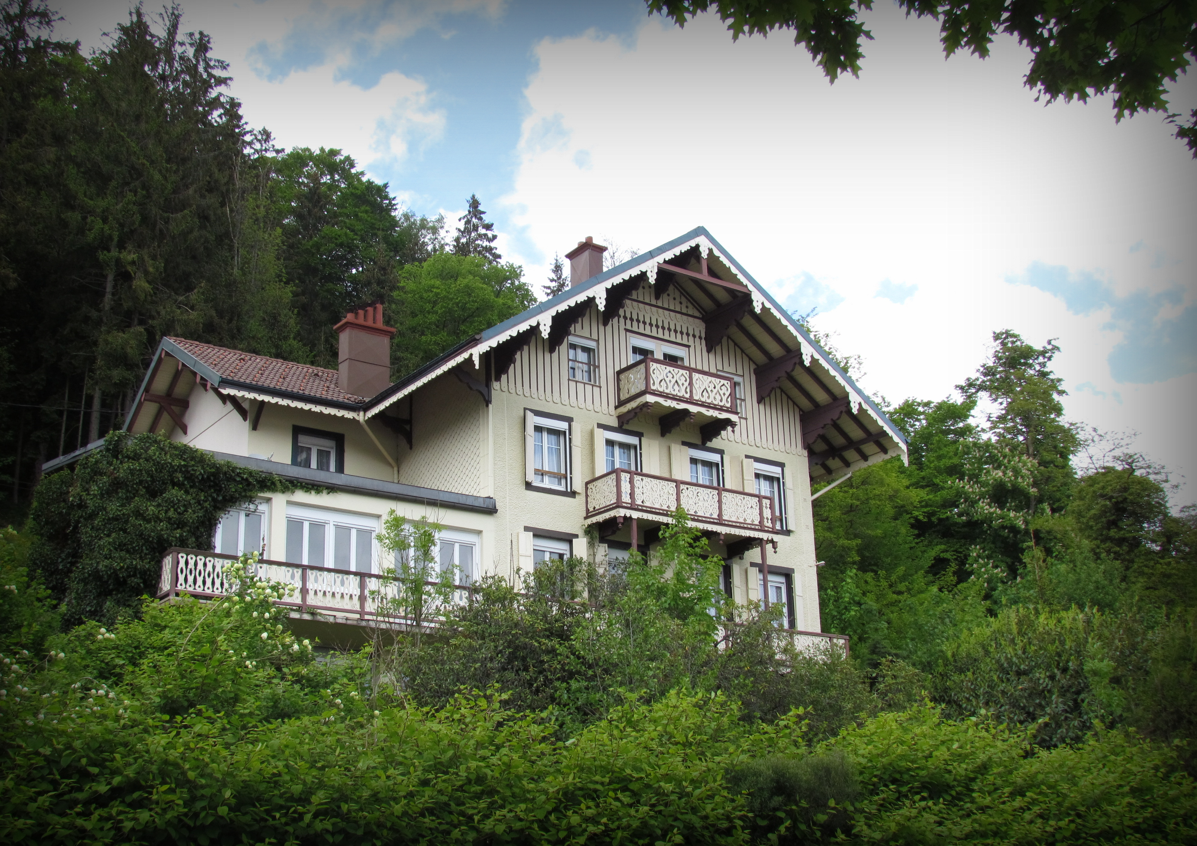 Joli chalet avec vue imprenable sur le lac de Gérardmer